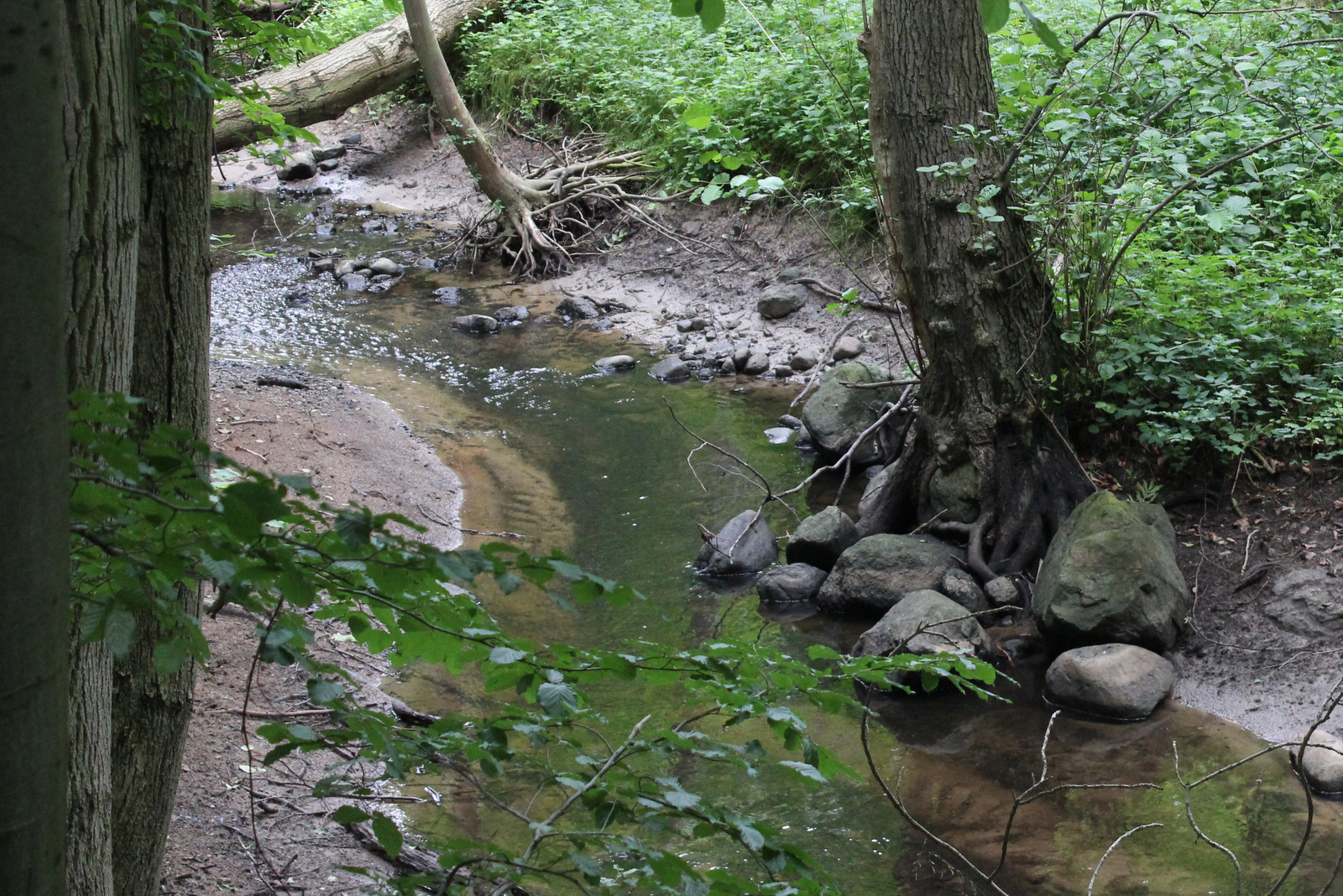 Naturschutzgebiet Beketal (N 302) im Landkreis Rostock (Mecklenburg-Vorpommern)